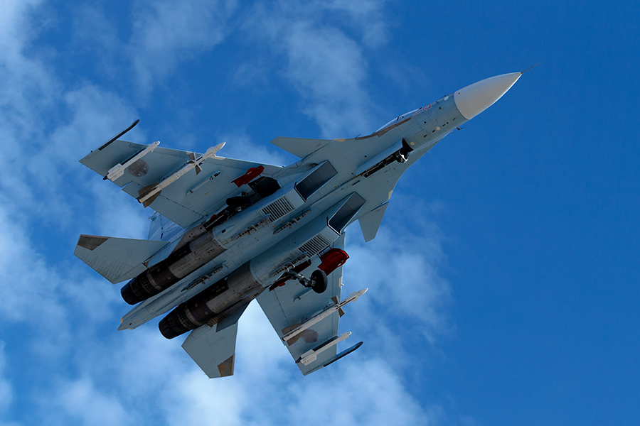 Будни ВКС РФ на авиабазе Химеймим в Сирии